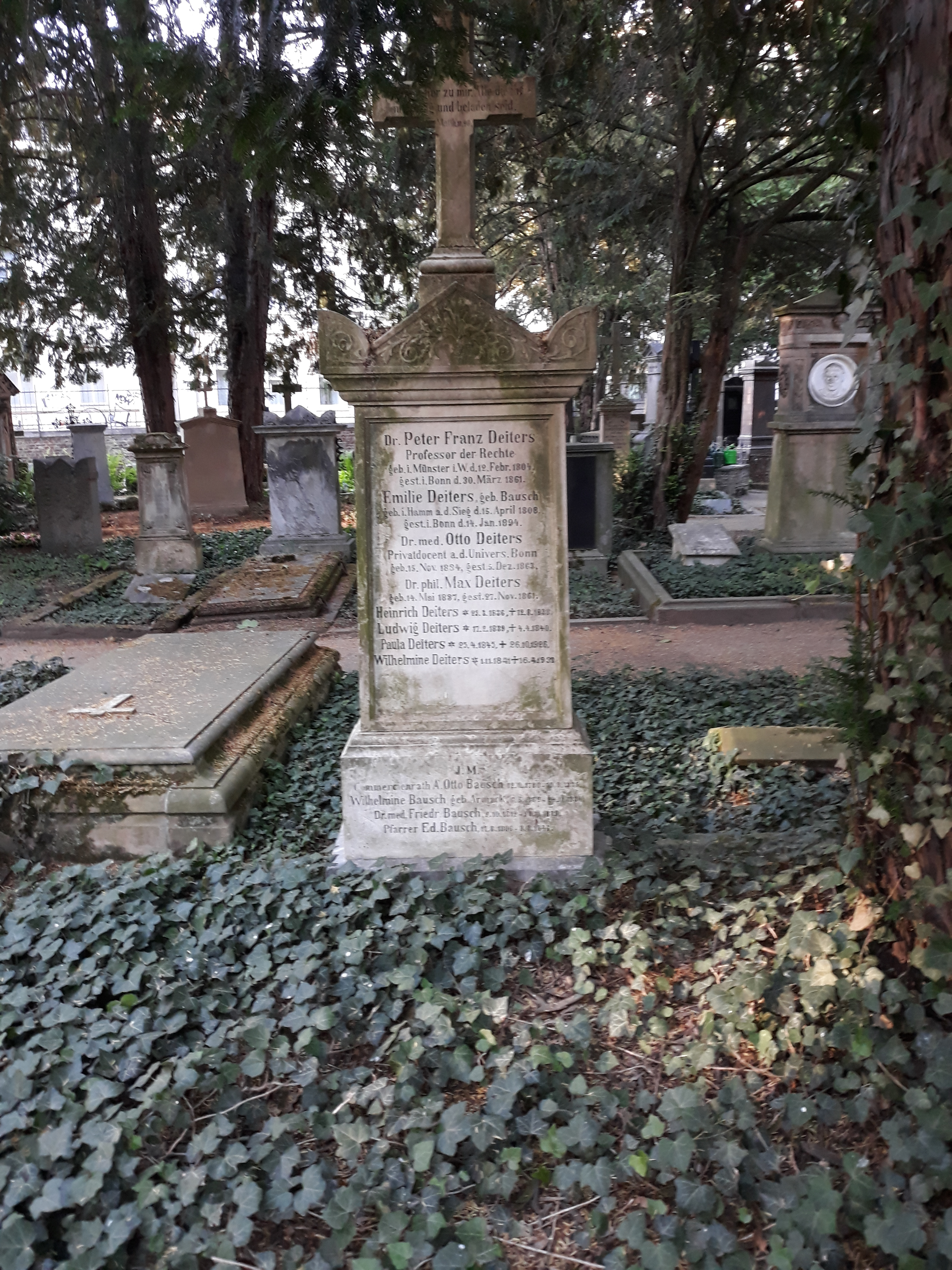 Das Familiengrab des deutschen Juristen Peter Franz Deiters auf dem Alten Friedhof Bonn.